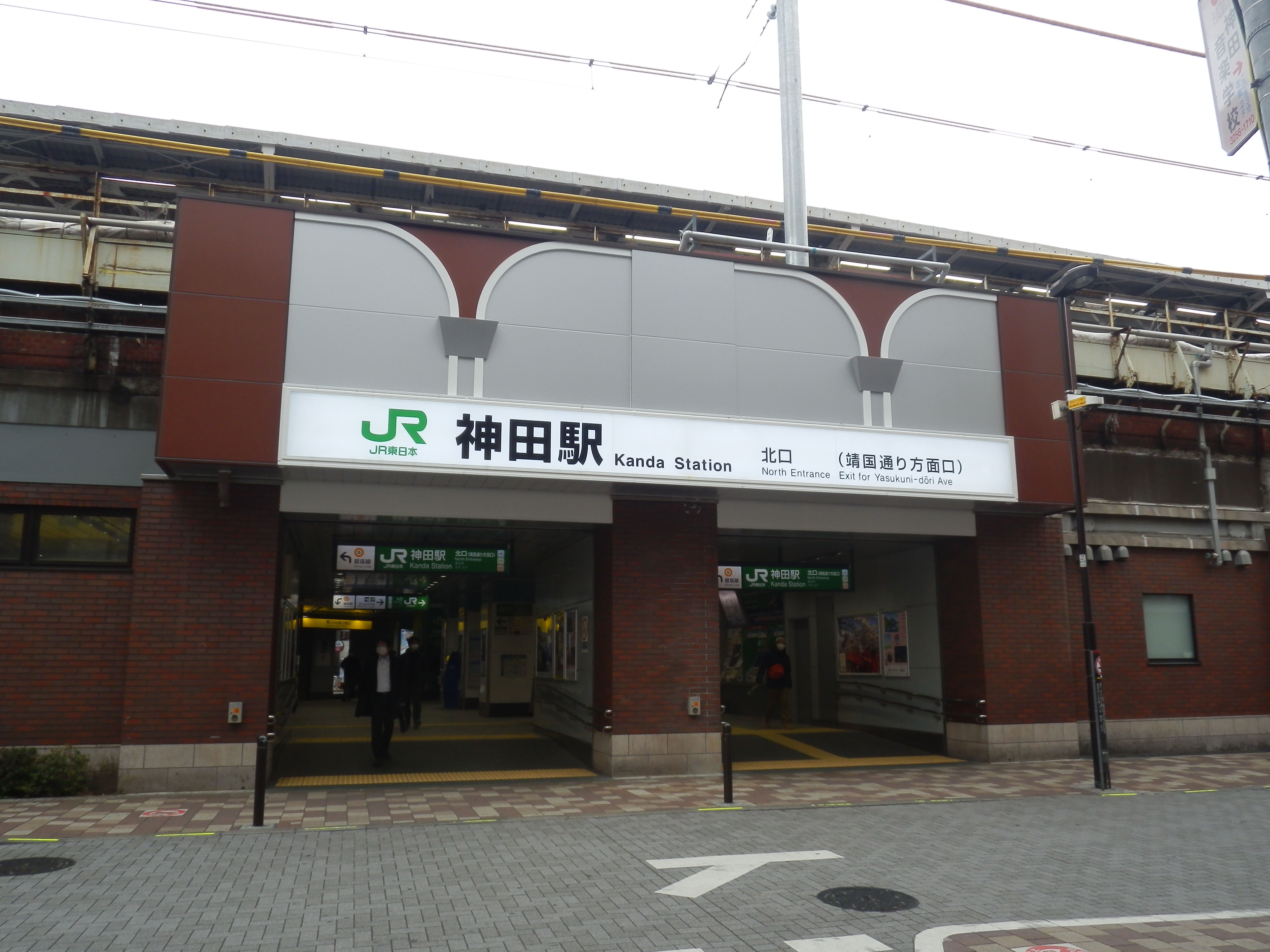 JR東日本神田駅北口（2020年）